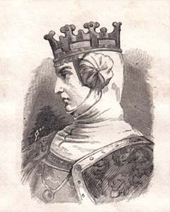 Summary Rainha de Portugal Licensing 20:49, 27 Fevereiro 2006 L Gonçalves 241x300 (30709 bytes) (Rainha de Portugal)